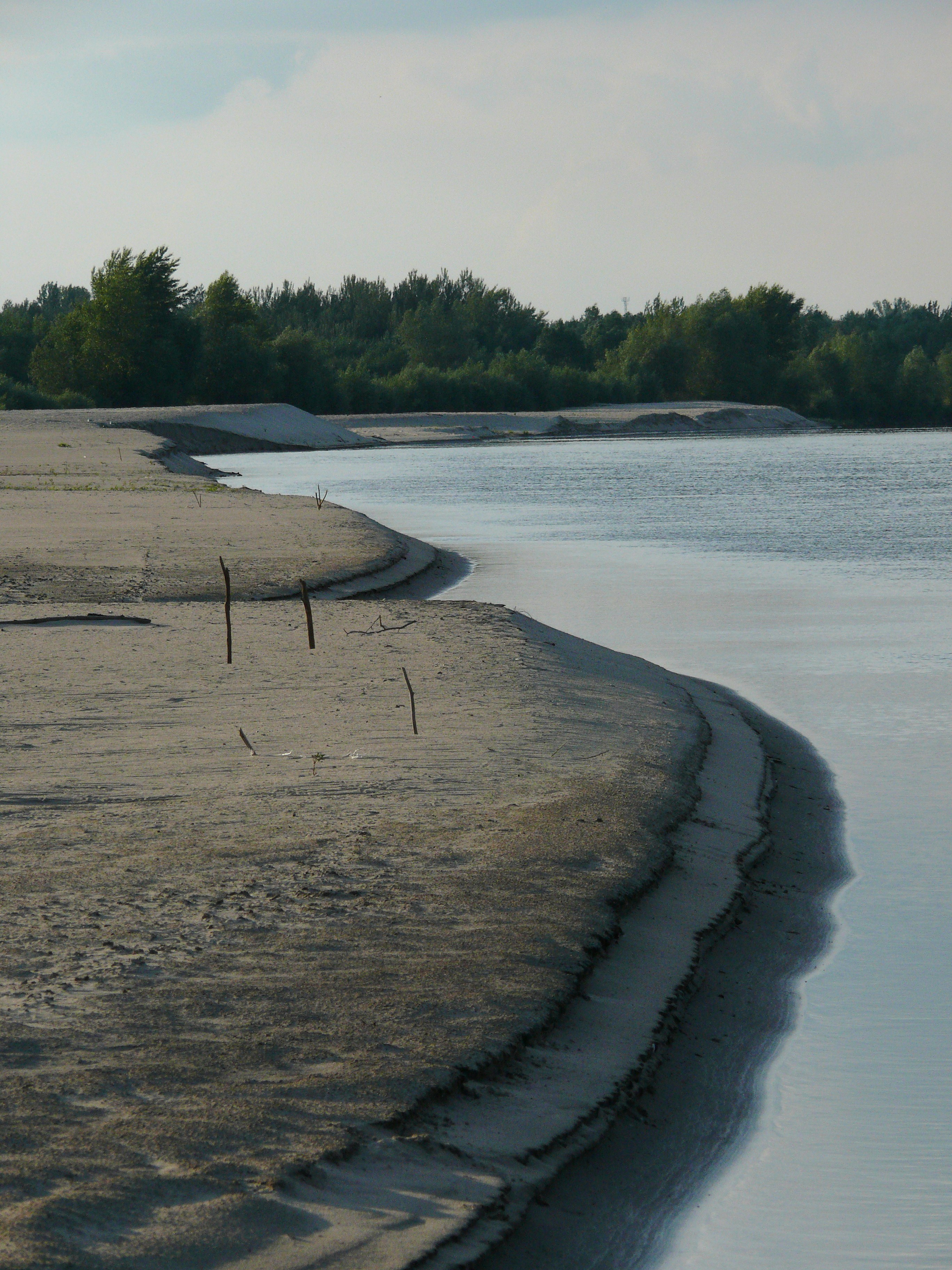 Brzeg Wisły na wysokości Boisk w gminie Solec nad Wisłą